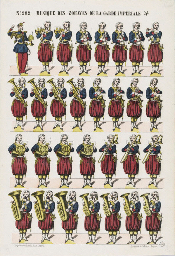 Image d'Epinal.